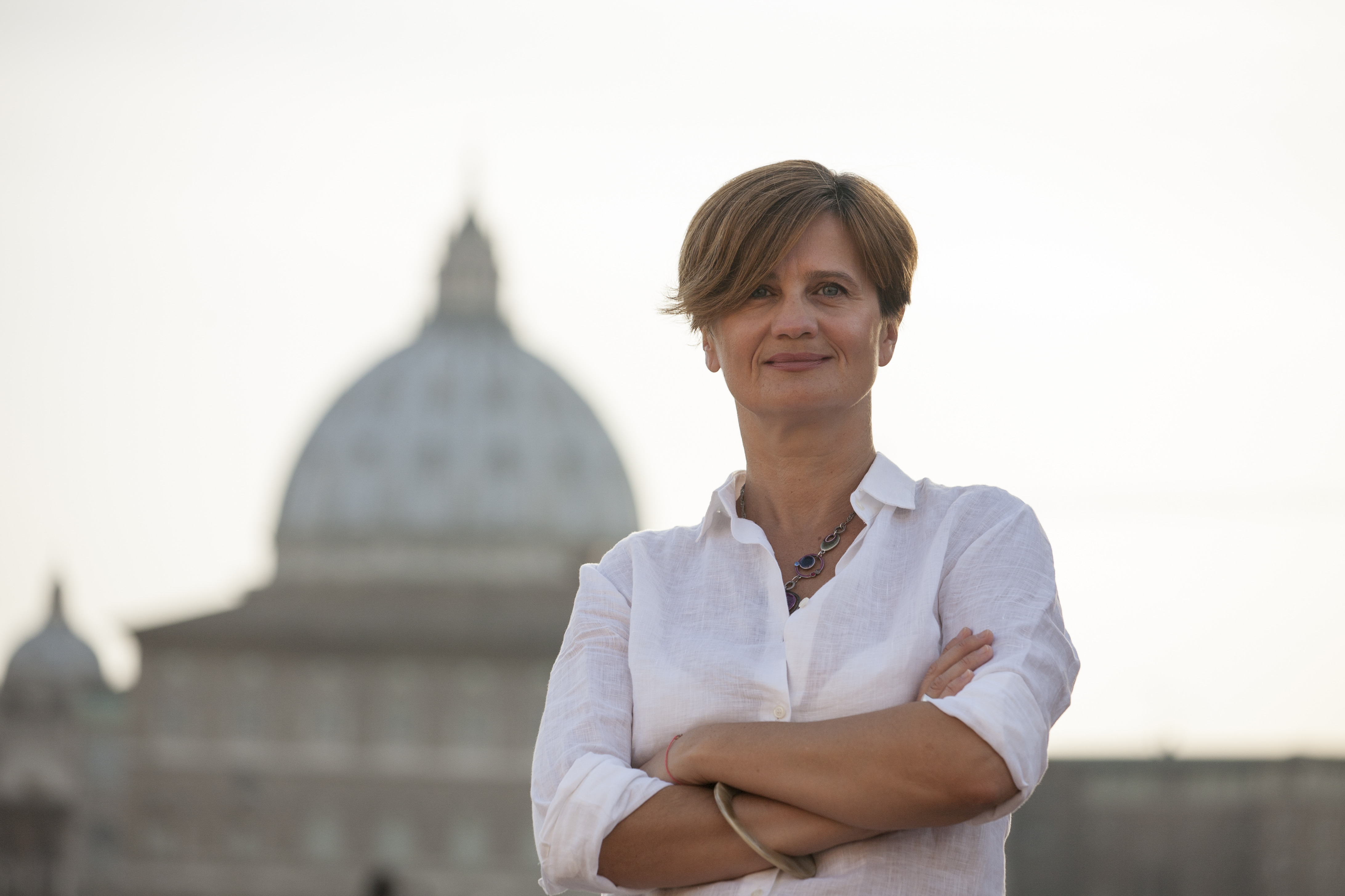 Mojca Širok, giornalista e scrittrice slovena.